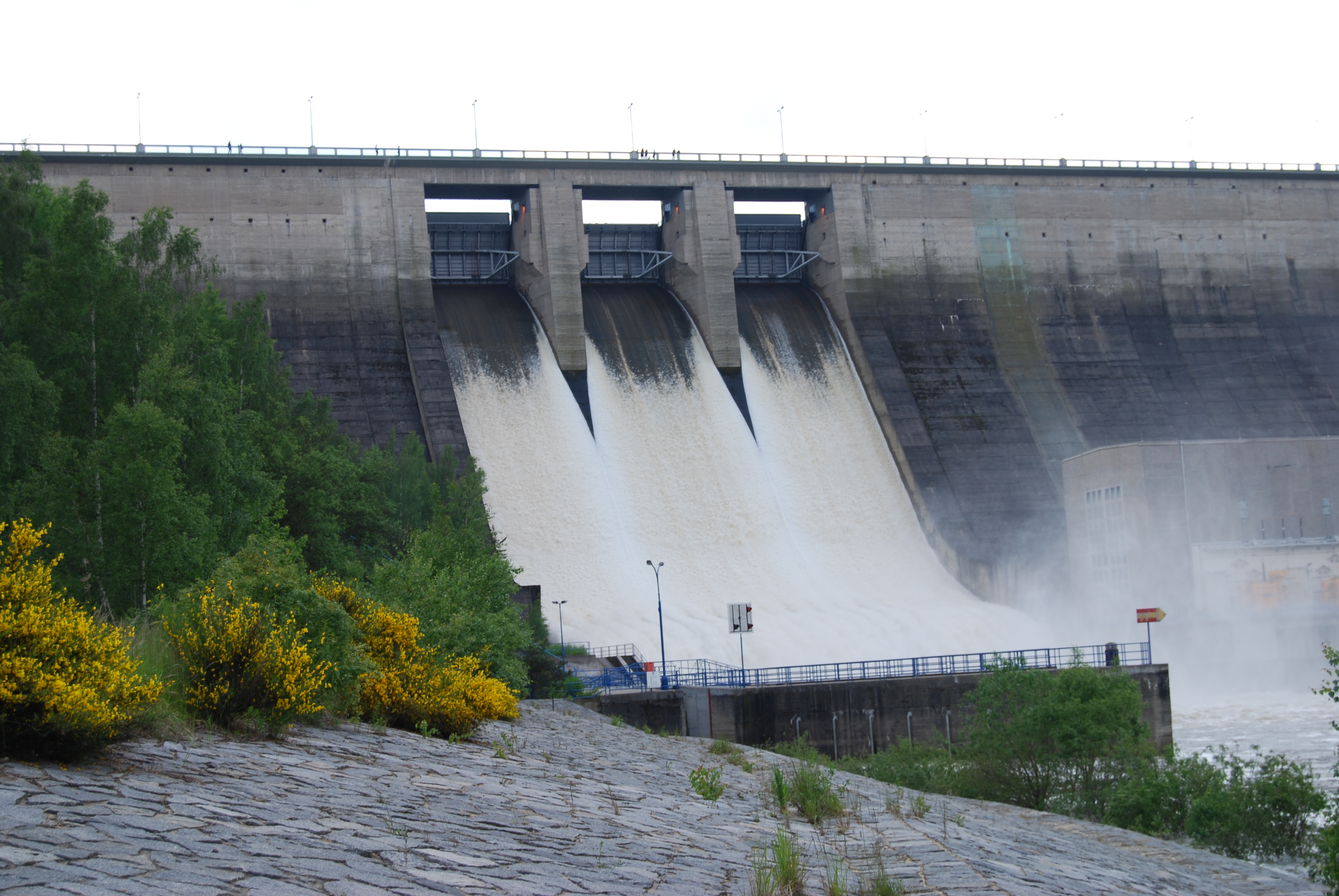 Povodně 2013. Pohled na hráz. Vodní nádrž Orlík (Orlická přehradní nádrž) na řece Vltavě. Česká republika. - Google Maps - Google Earth